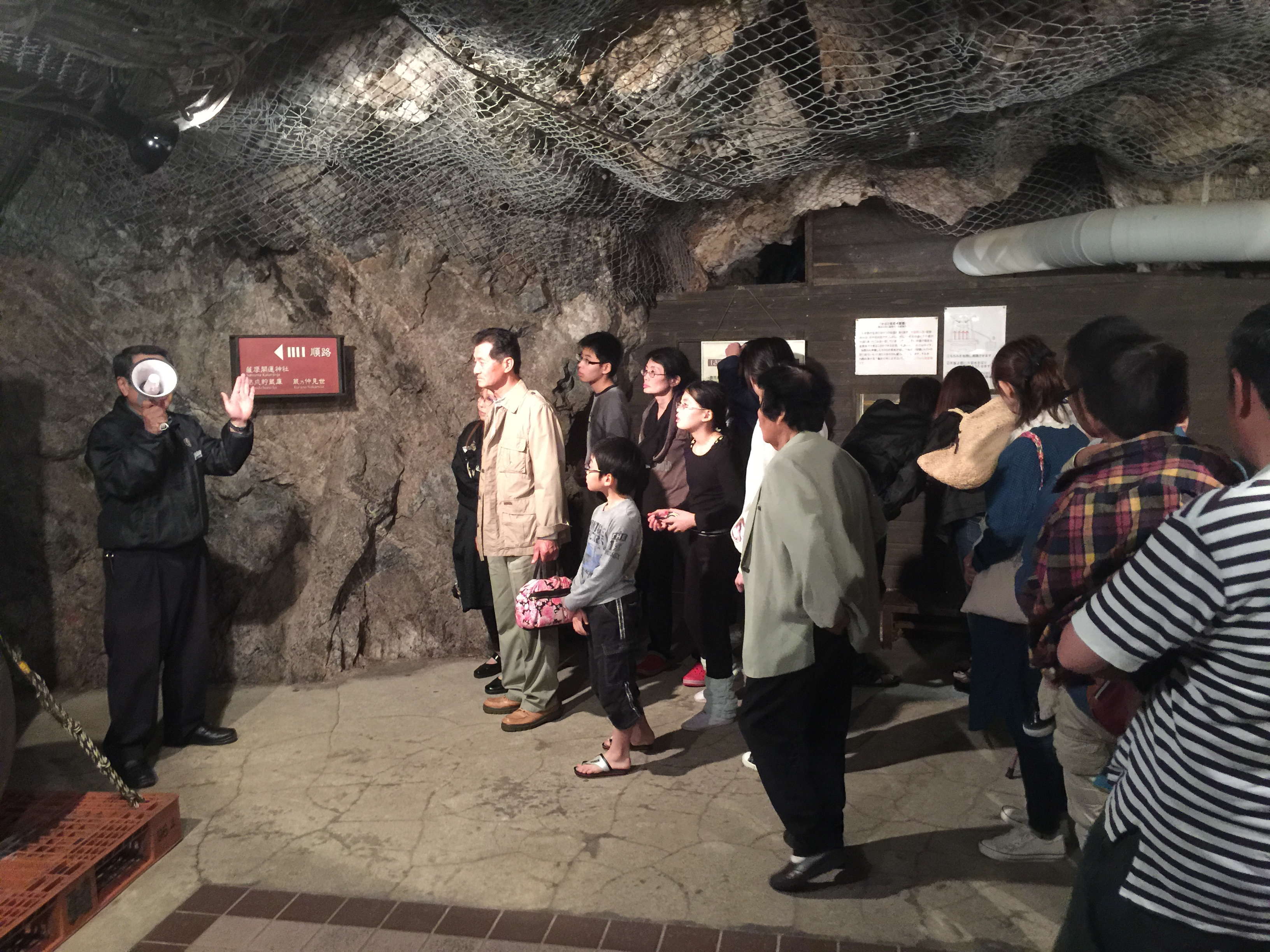 薩摩金山蔵での坑道見学（旧串木野金山）